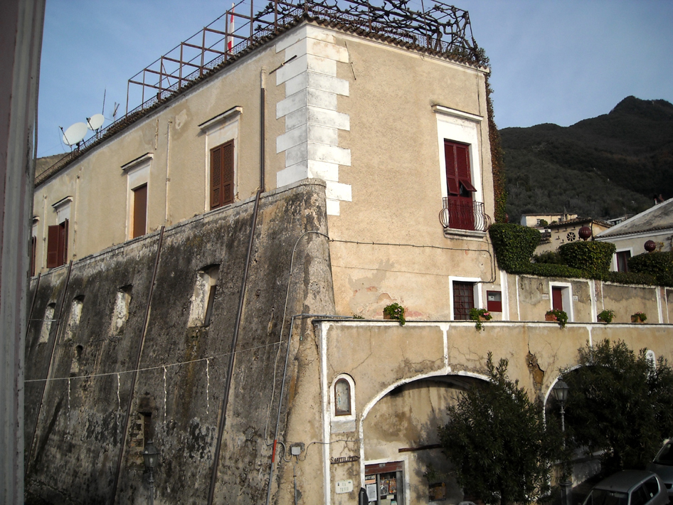 autore: Luigi Bruno Di Cosmo; fonte: foto propria; descrizione: S. Angelo d'Alife. Palazzo Principi Windisch Graetz (particolari); licenza d'uso: pubblico dominio